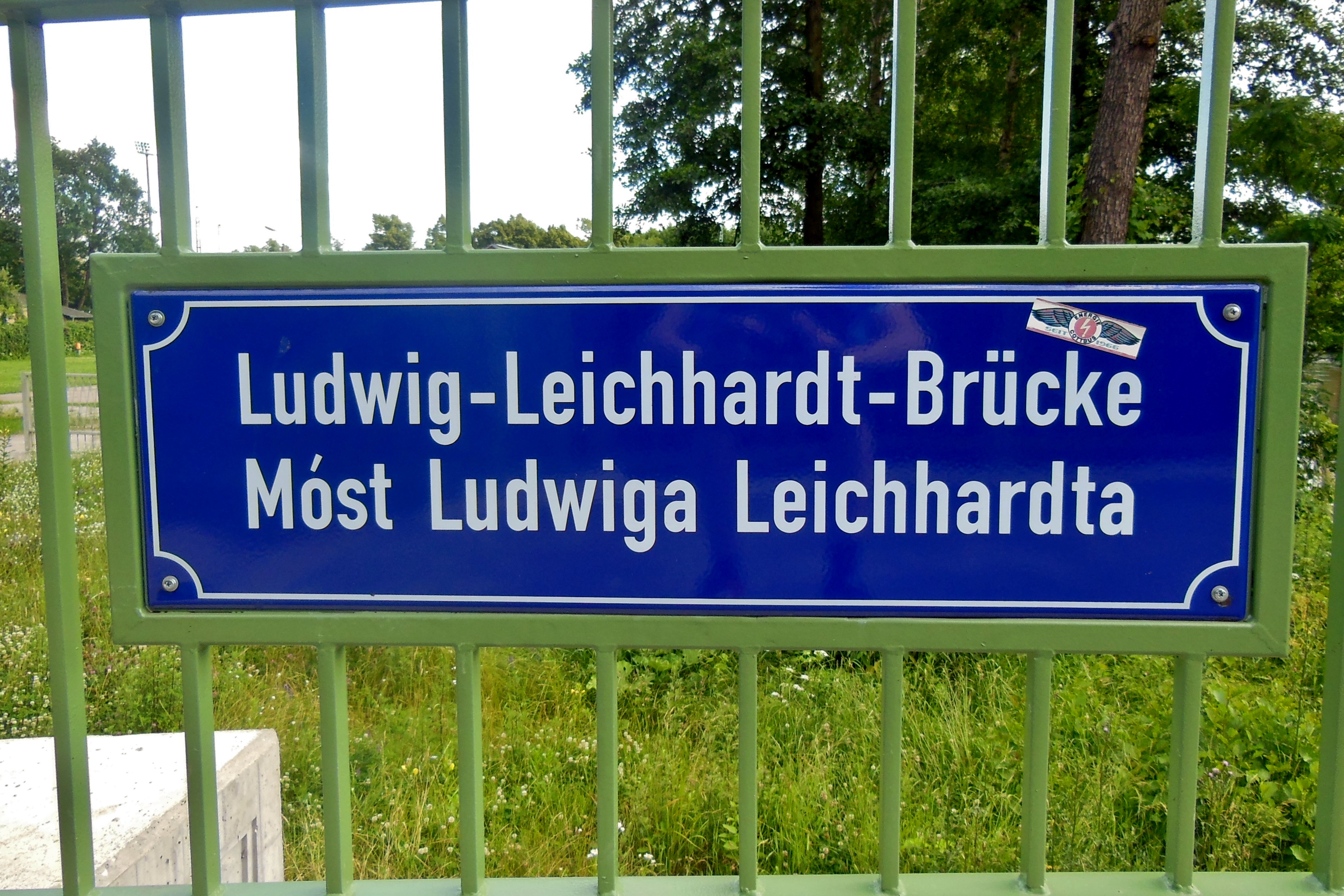 Schild an der Ludwig-Leichhardt-Brücke/Móst Ludwiga Leichhardta in Cottbus